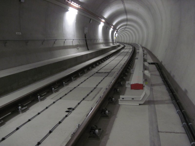 Gleis auf einem Masse-Feder-System am U-Bahnhof Kaulbachplatz der Nürnberger Linie U3 nach der Fertigstellung